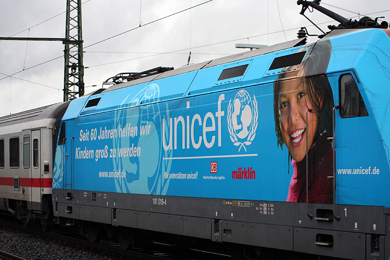 Nahaufnahme der 101 016 "Unicef" in Aalen. [IC 2065]